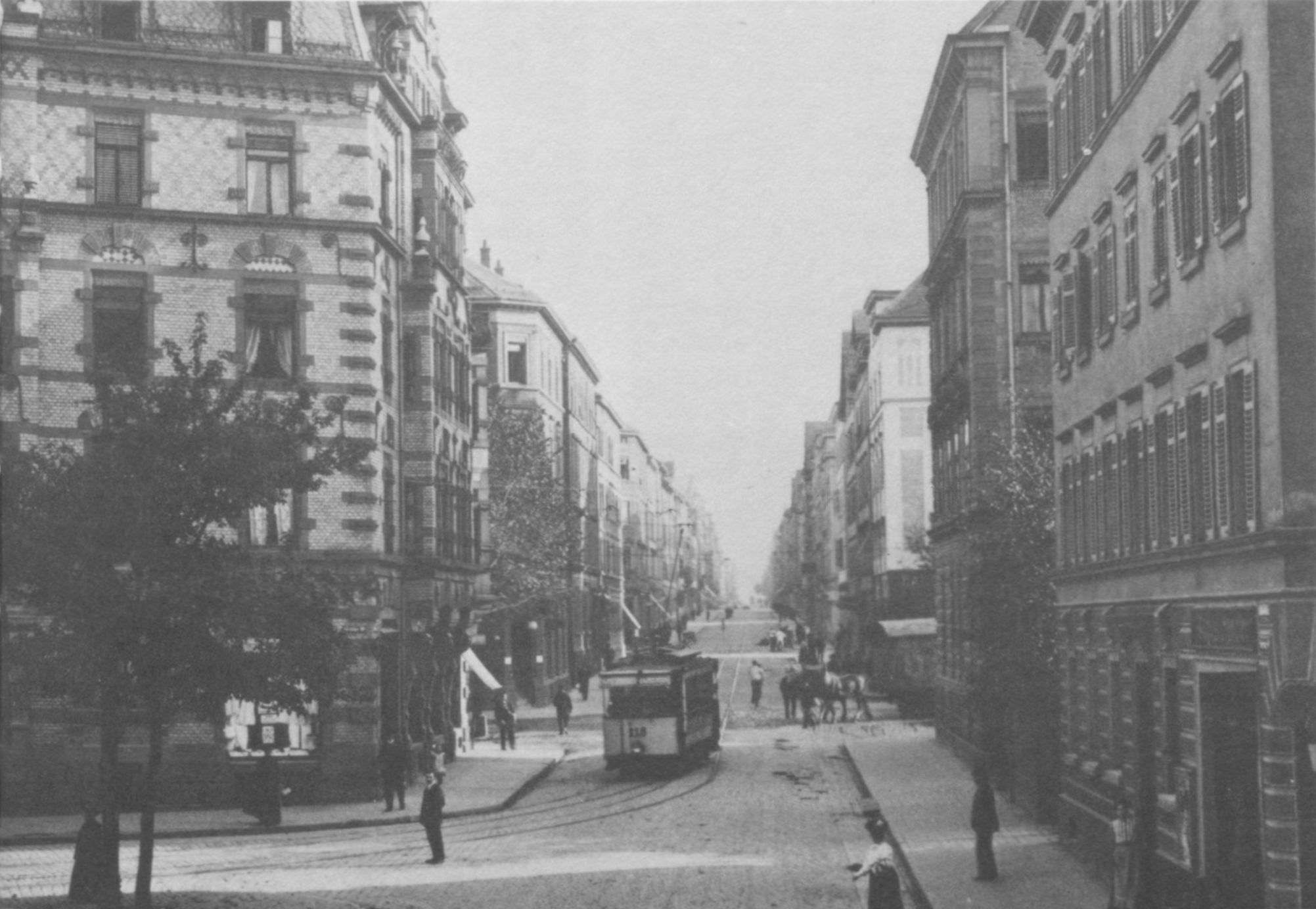 Blick von der Breitscheidstraße nach Süden auf die Silberburgstraße in Stuttgart, um 1900. Die sogenannte Rundbahn der Straßenbahnen, ab 1910 Linie 3, bog bis 1924 an dem dreieckigen Platz (Haltestelle „Dreieck“) rechtwinklig in die Breitscheidstraße ein.